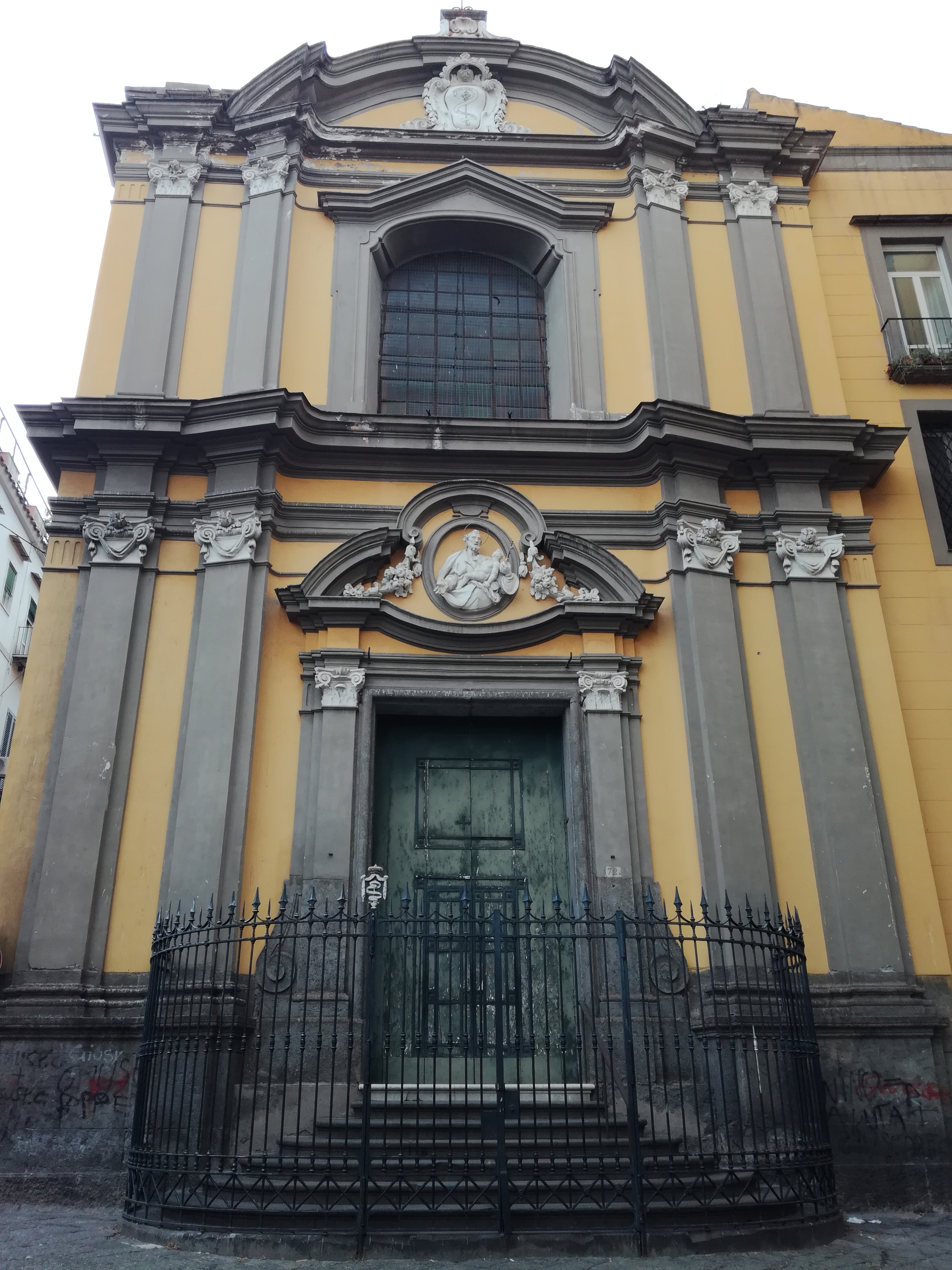 Facciata di San Giuseppe dei Nudi